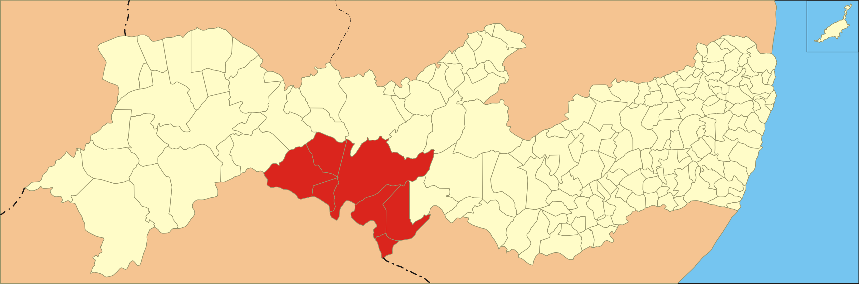 Localização da microrregião no estado de Pernambuco.